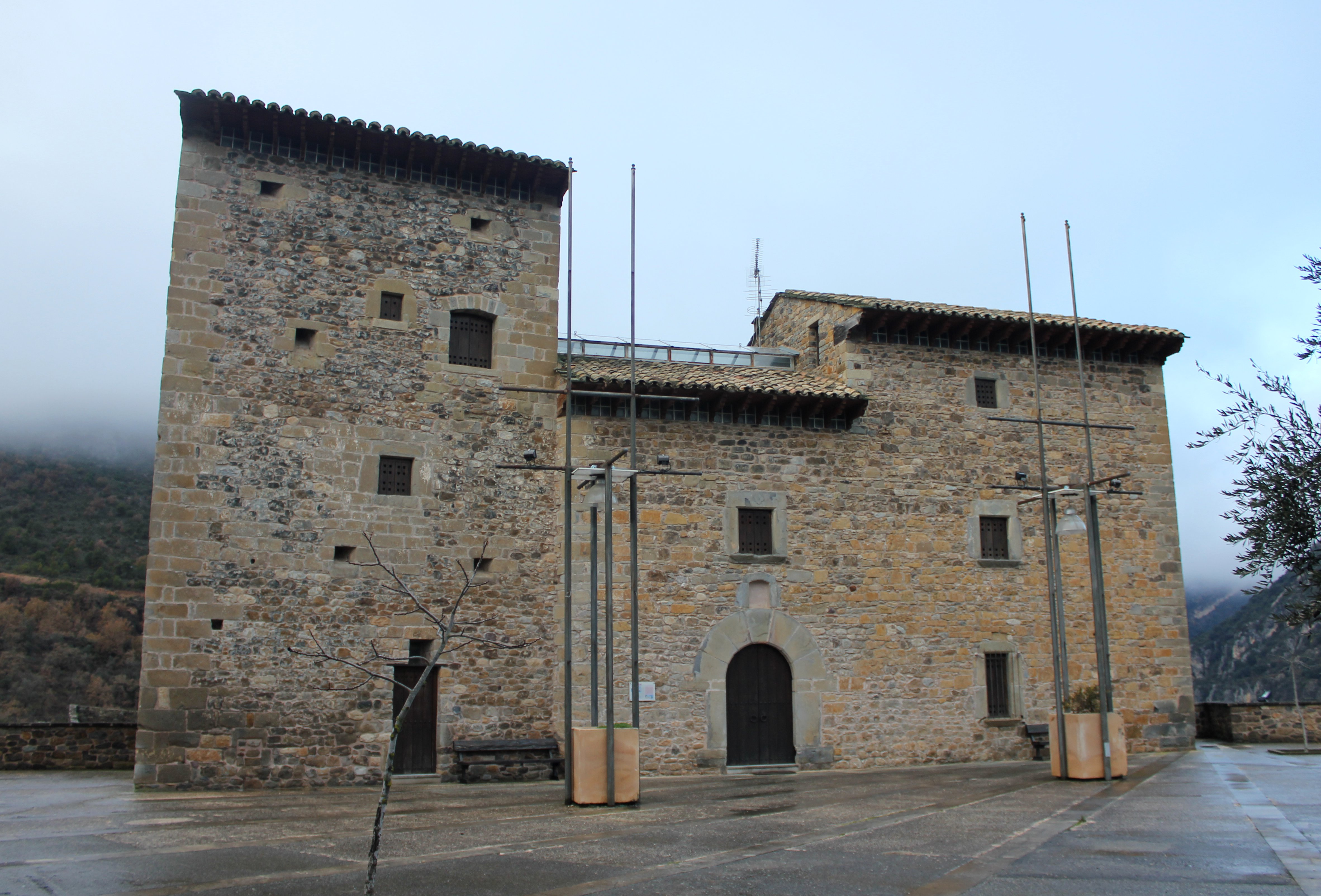 Aragonés: Ligüerre